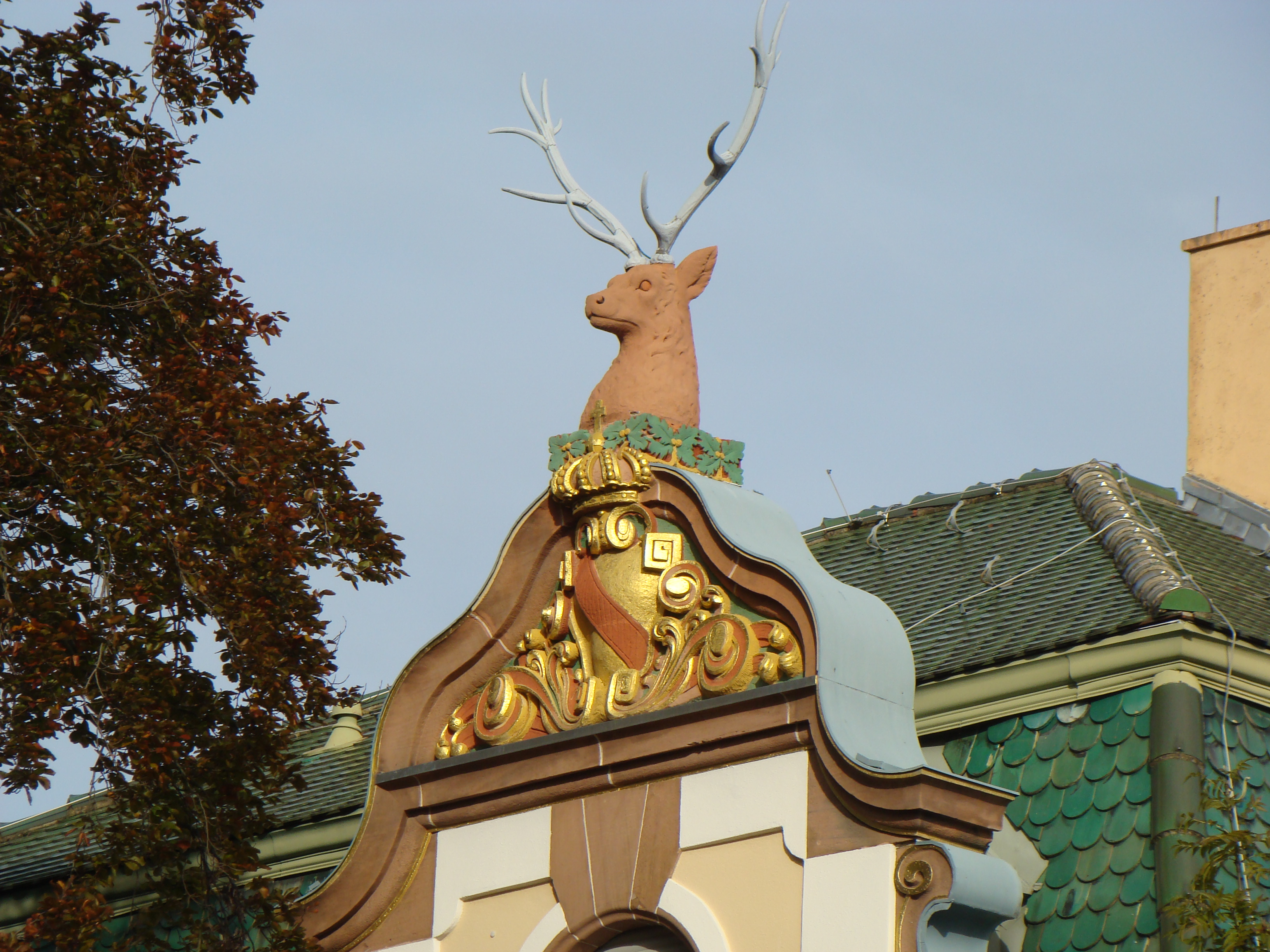 Altes Forsthaus in Wiesloch